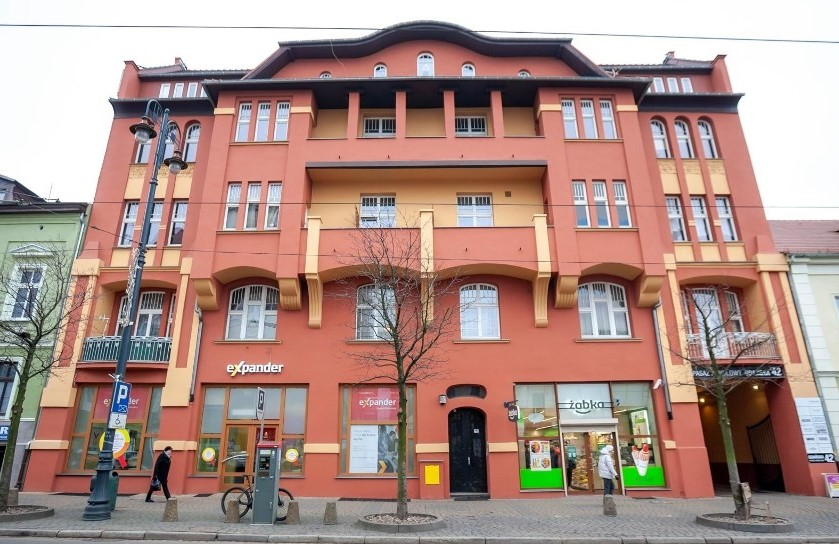 Kamienica przy ul. Gdańskiej 42 w Bydgoszczy